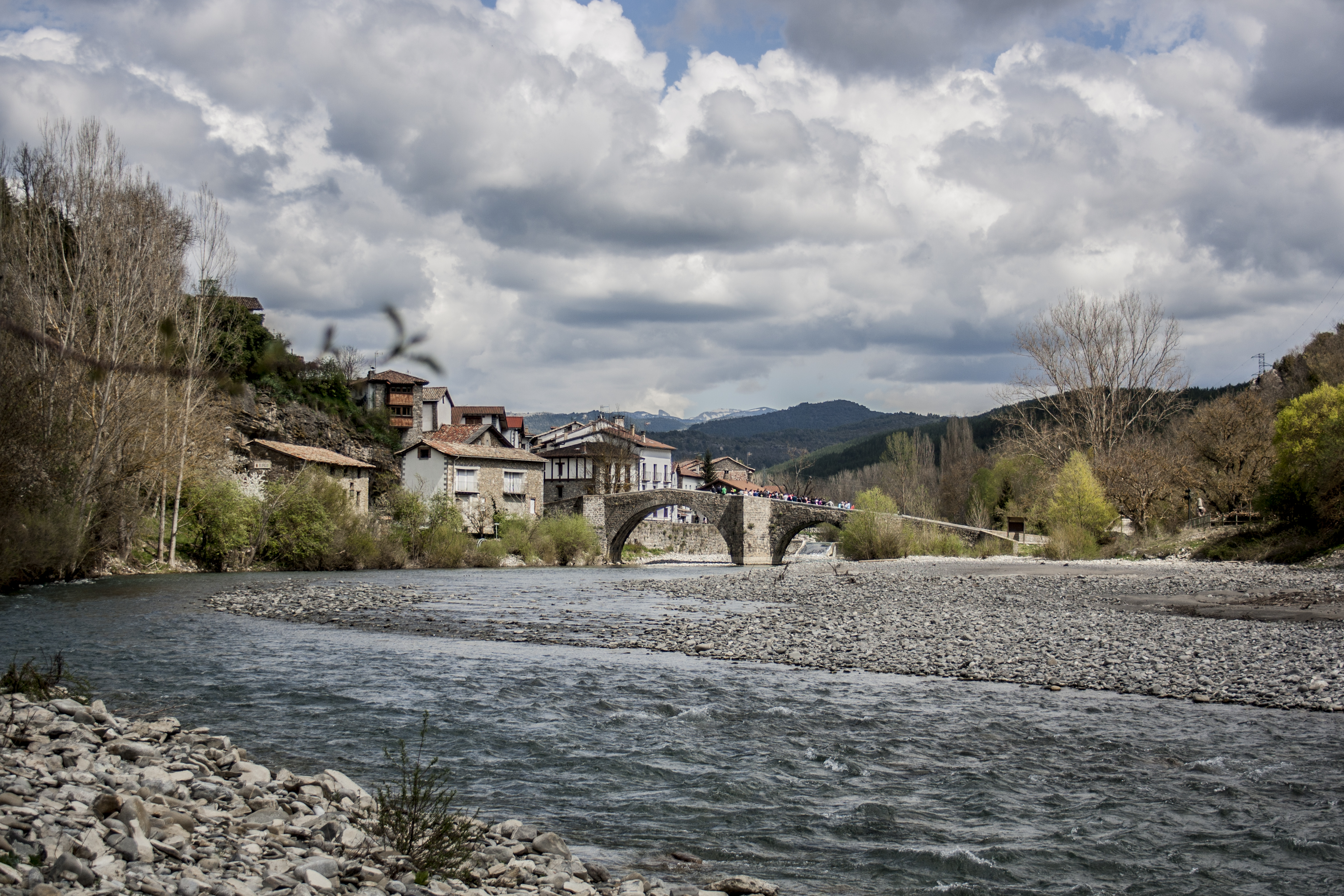 Ezka ibaia Burgin barrena, ibaia gurutzatuz Erdi Aroko zubia duela, Erronkaribar, Nafarroa